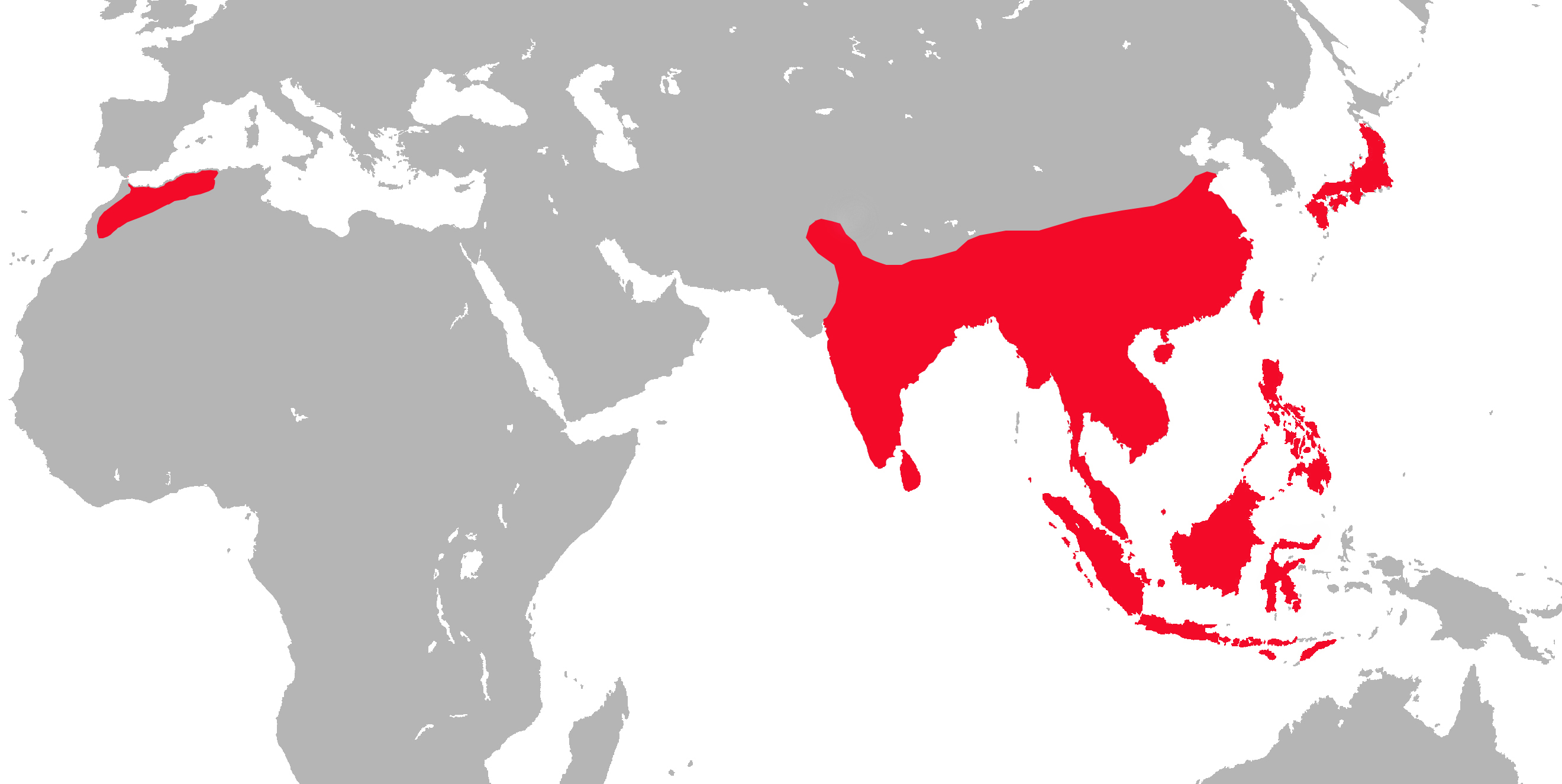 Carte de la répartition mondiale des macaques. Etablie par Christophe Chauvin.